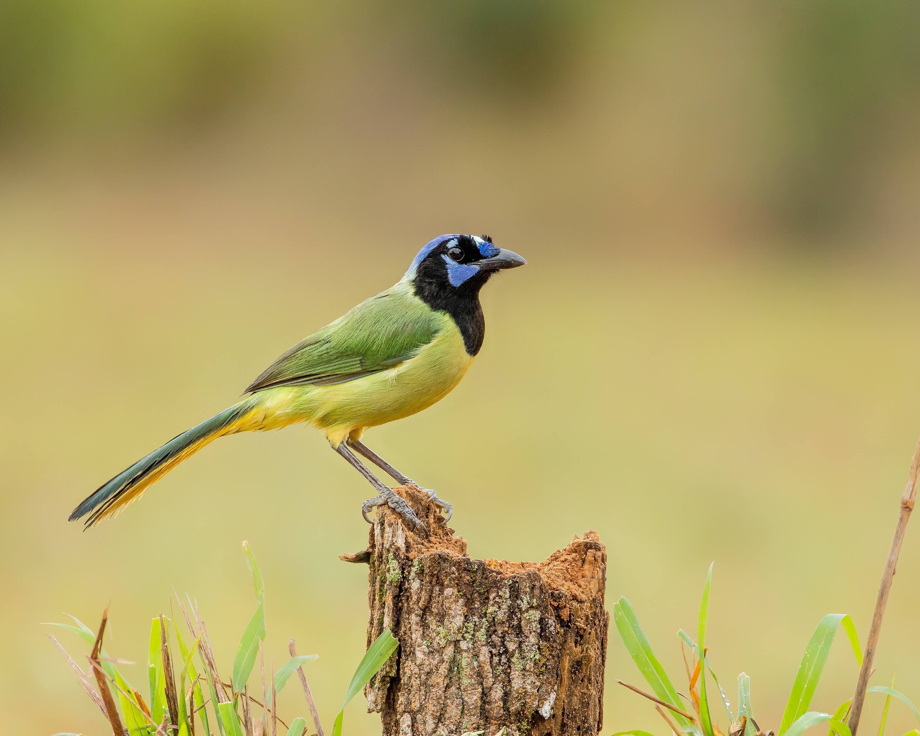 Taken in Texas